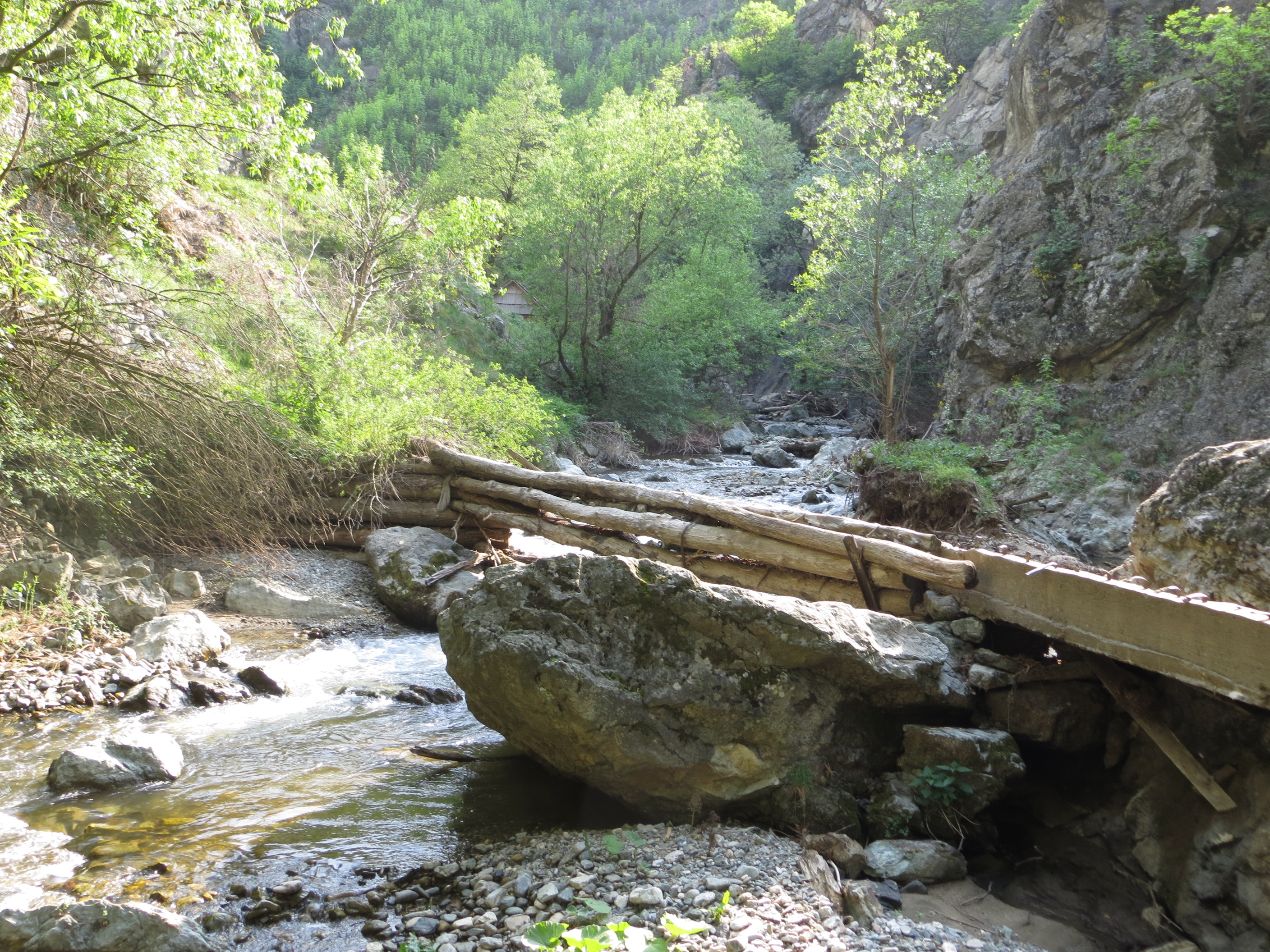 Ansamblul de mori din Eftimie Murgu - baraj